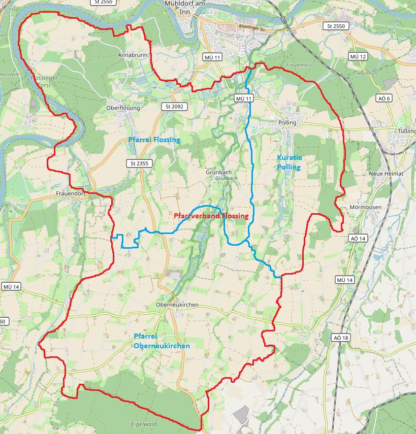 Pfarrverband Flossing mit den Pfarreien Flossing und Oberneukirchen und der Kuratie Polling (c) optenstreetmap